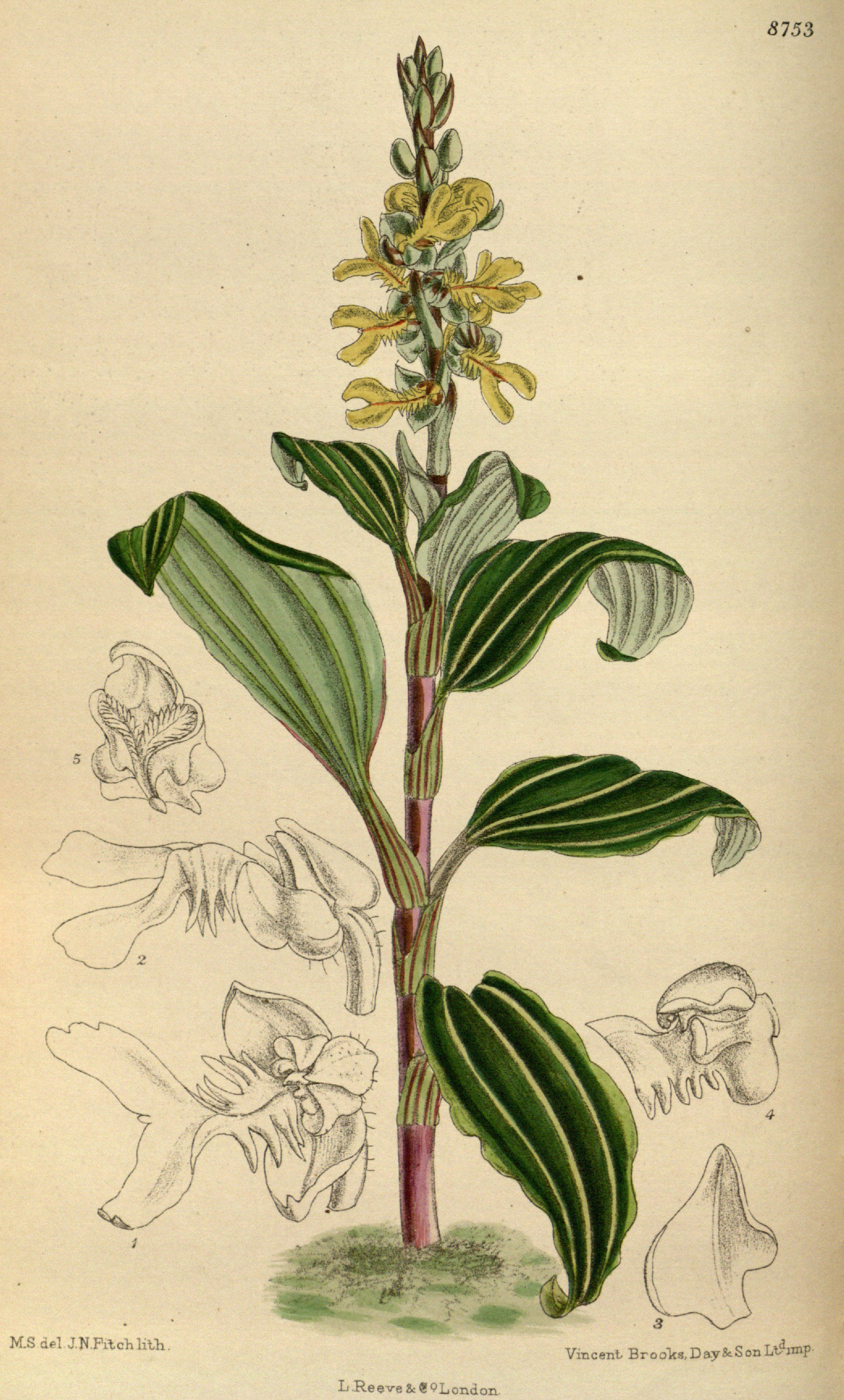 Odontochilus lanceolatus (= Anoectochilus lanceolatus), Orchidaceae